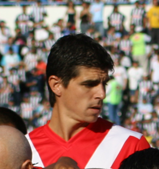 Antes de que les clavaran siete, tan optimistas que se veían.